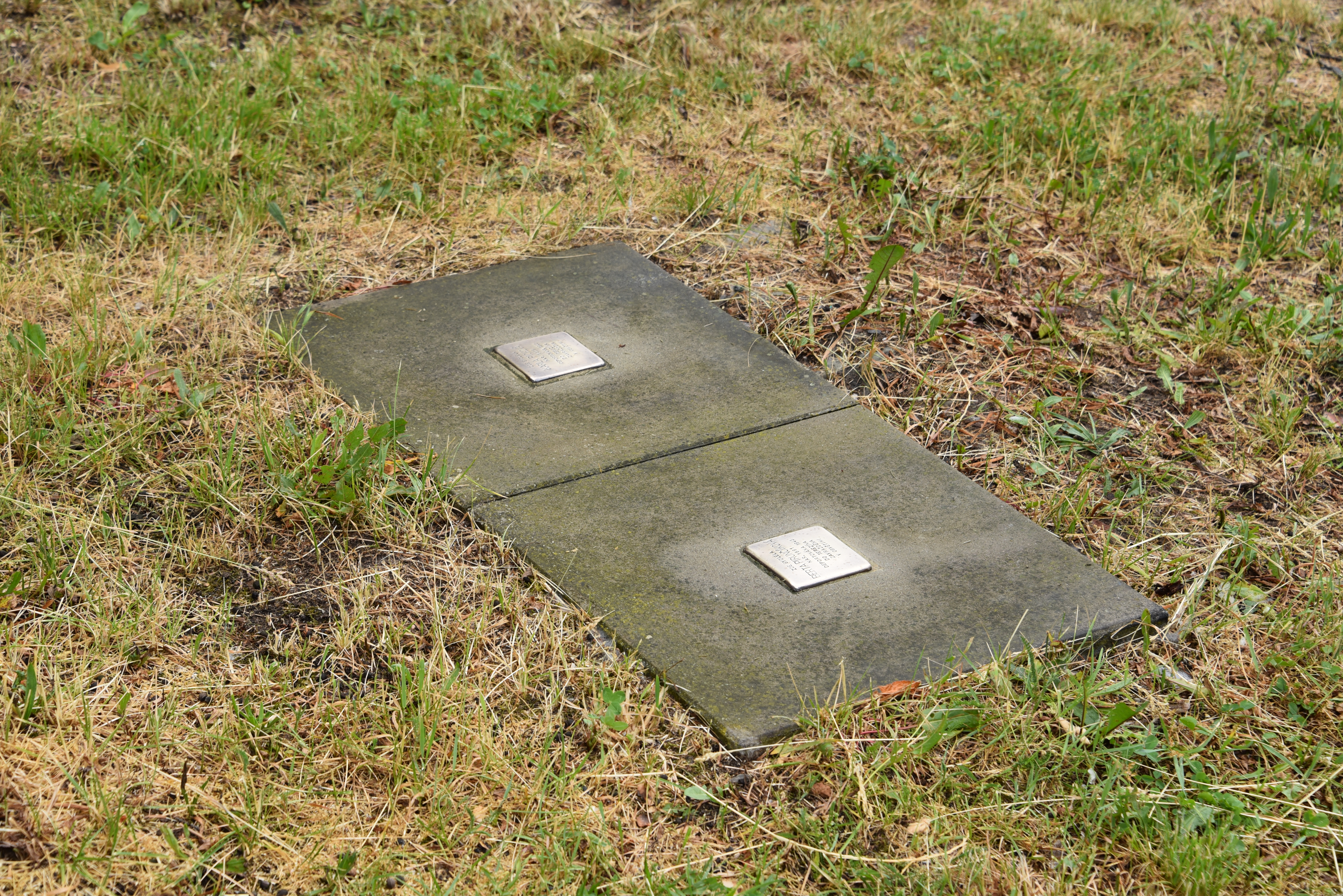 Stolpersteine für Berta Piruncikova und Karla Pickova